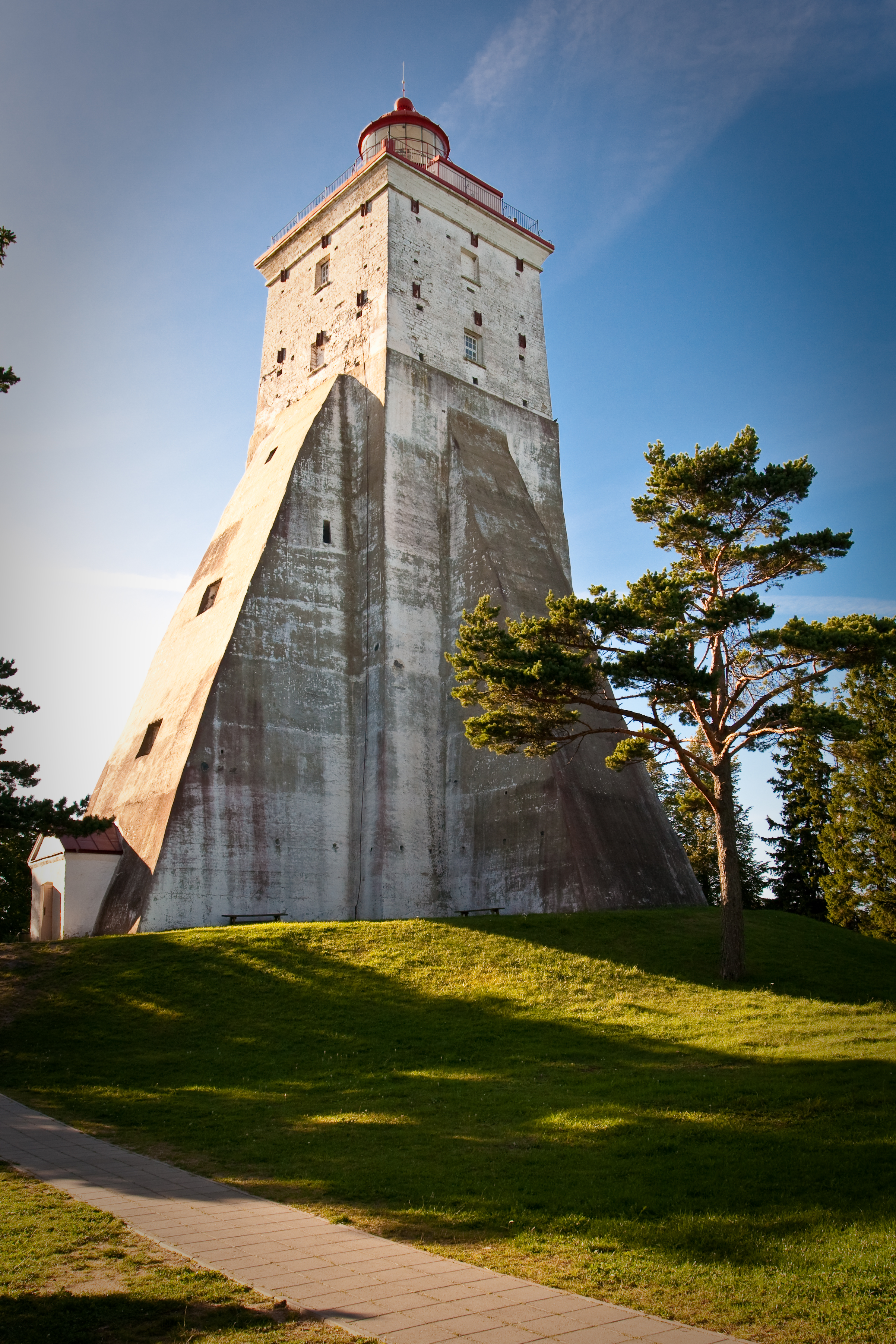 Kõpu Lighthouse on Hiiumaa, Estonia.